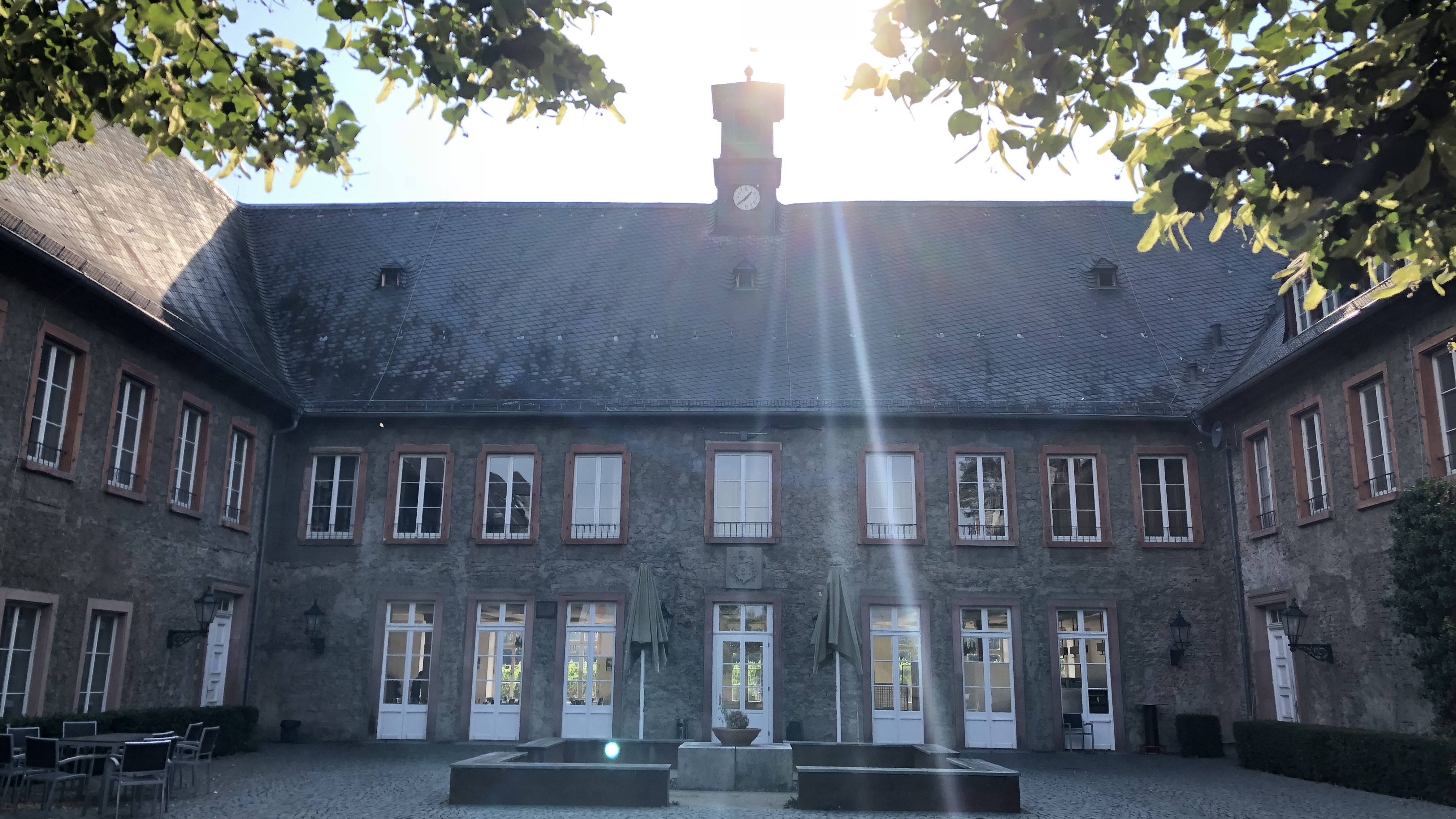 Westflügel Schloss Reichartshausen